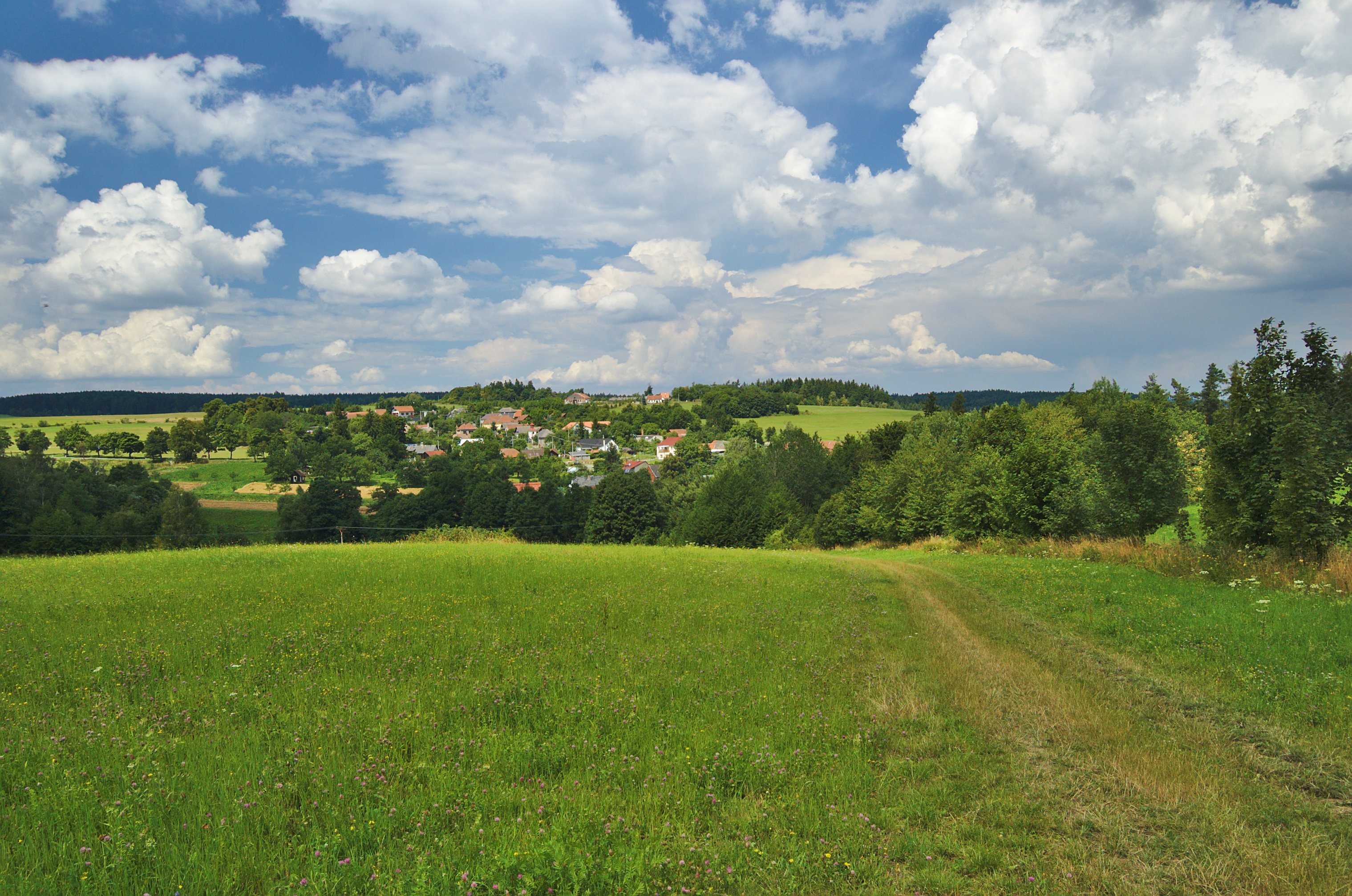 Pohled na Lhotu u Konice z cesty od Labutic, okres Prostějov